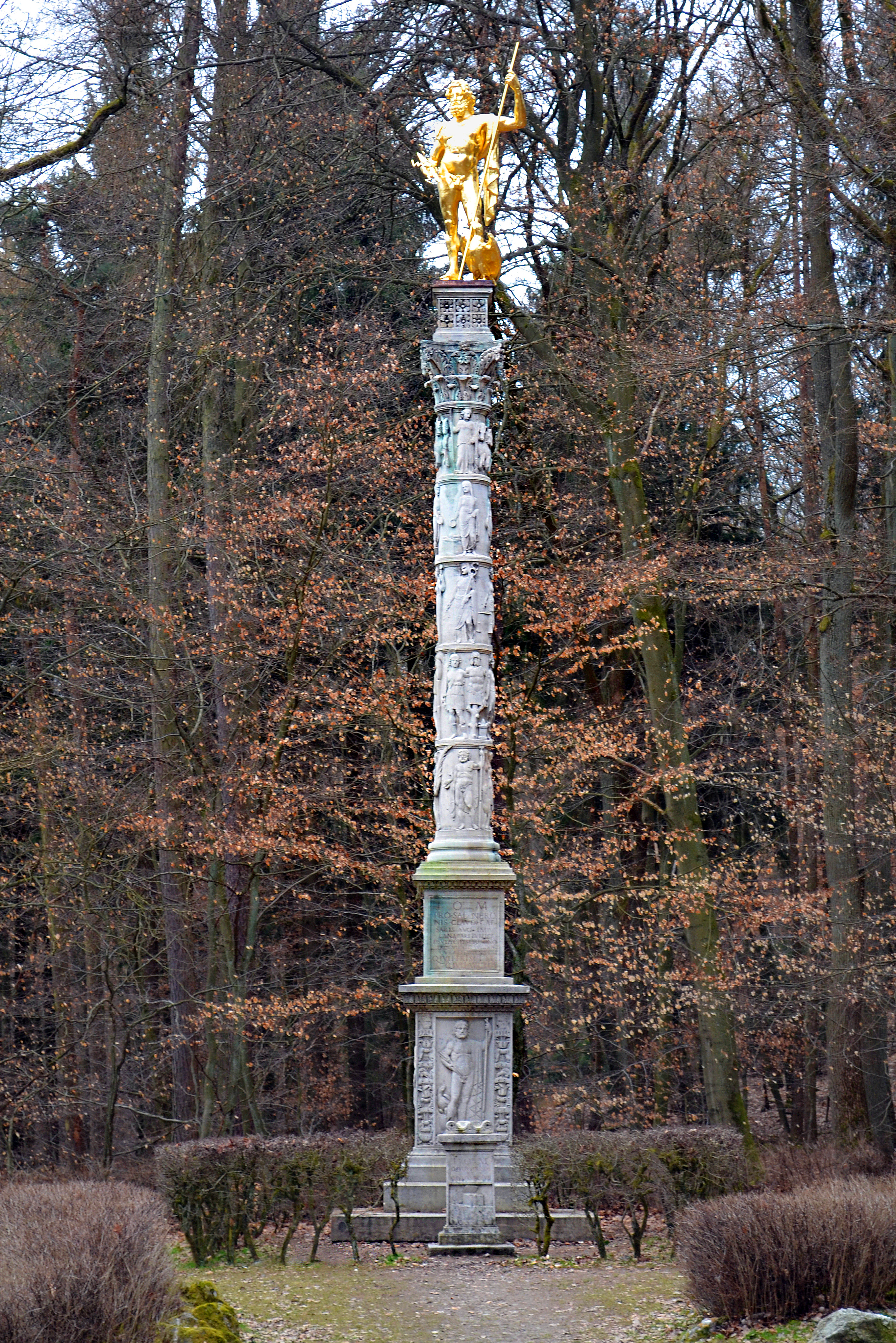 Bad Homburg, Saalburg, Jupitersäule